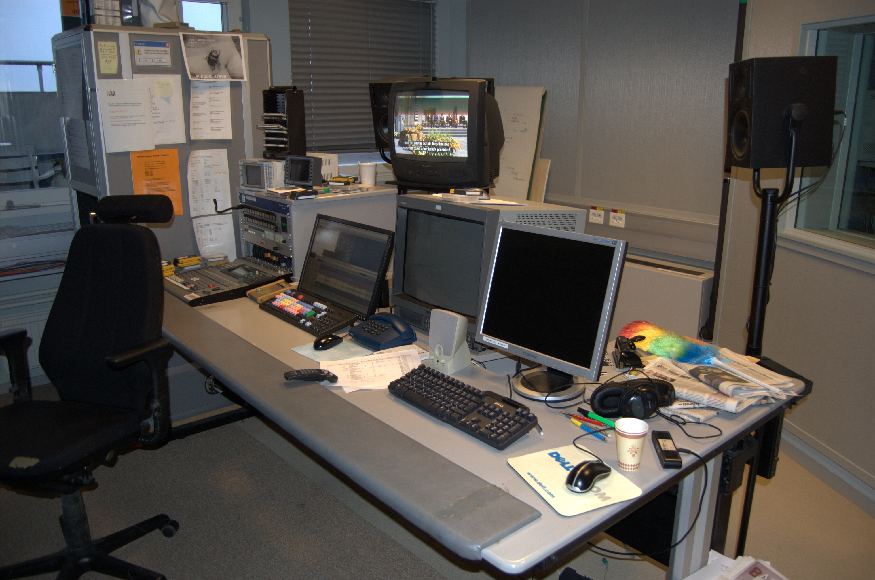 Klippningsrum i Sveriges Televisions lokaler i Stockholm. Notera att all klippning sköts digitalt.